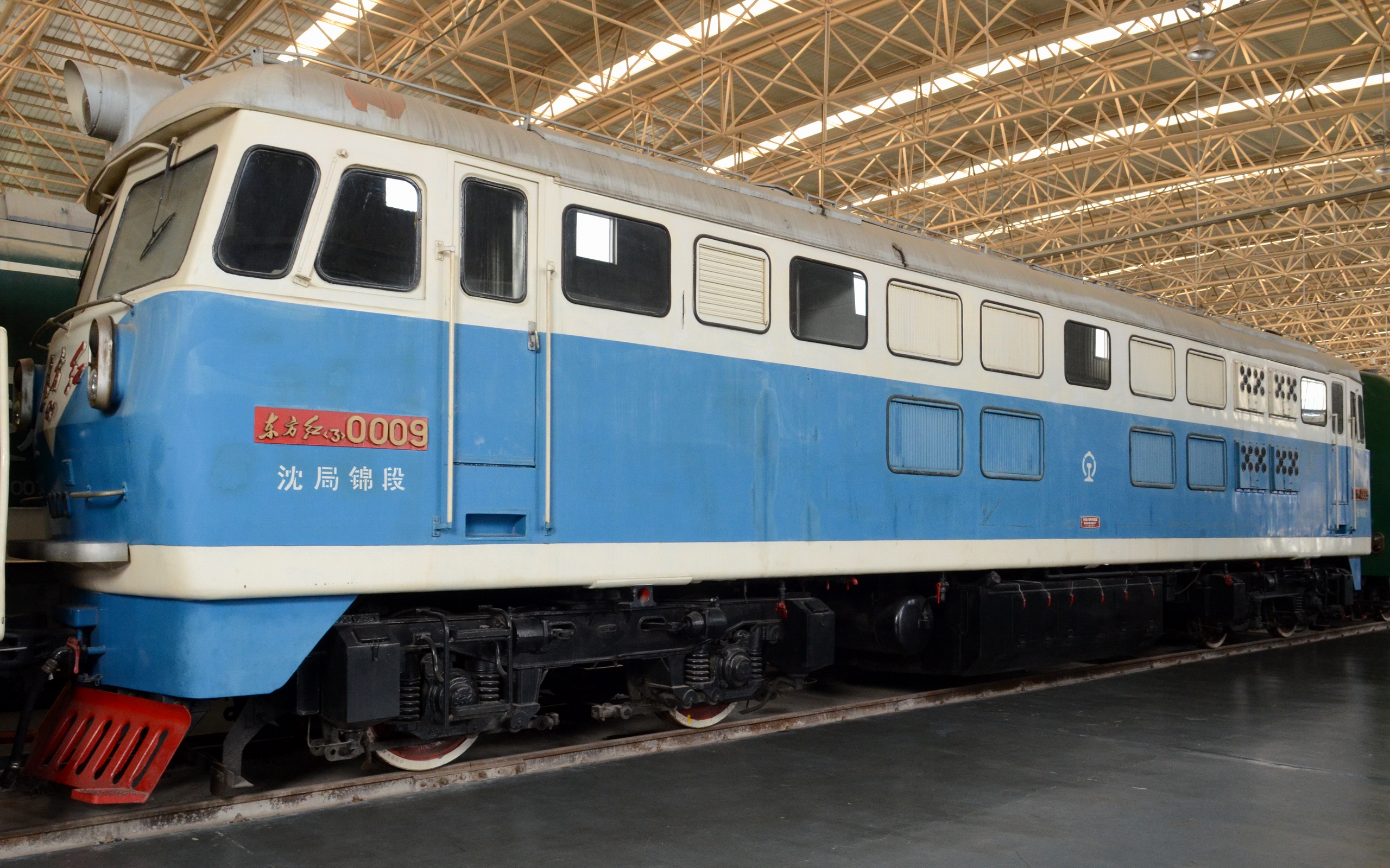 东方红3型0009号液力传动柴油机车保存在中国铁道博物馆